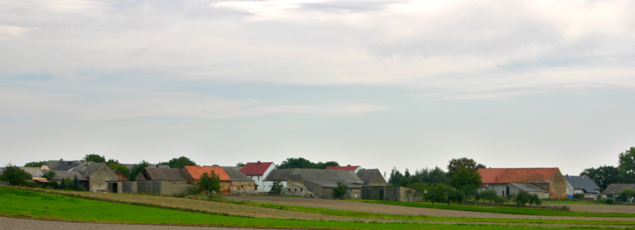 Krobusz (dodatkowa nazwa w j. niem. Ziabnik – wieś w Polsce położona w województwie opolskim, w powiecie prudnickim, w gminie Biała.